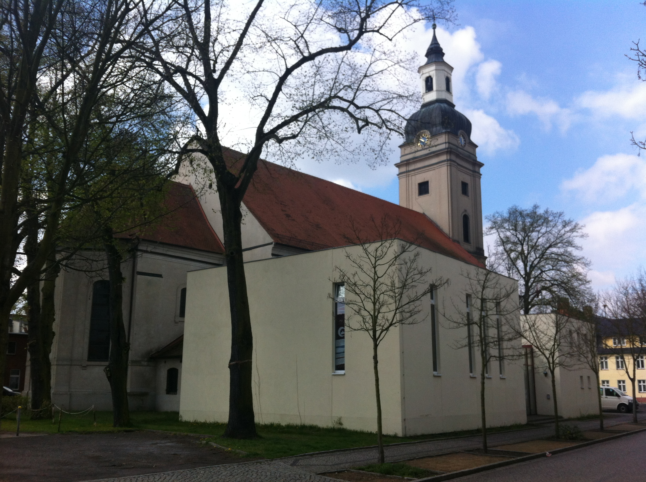 Stadtkirche St. Trinitatis (Genthin) von Nordwesten mit neuen Funktionsgebäuden (Junge Kirche) This is a photograph of an architectural monument. It is on the list of cultural monuments of Genthin